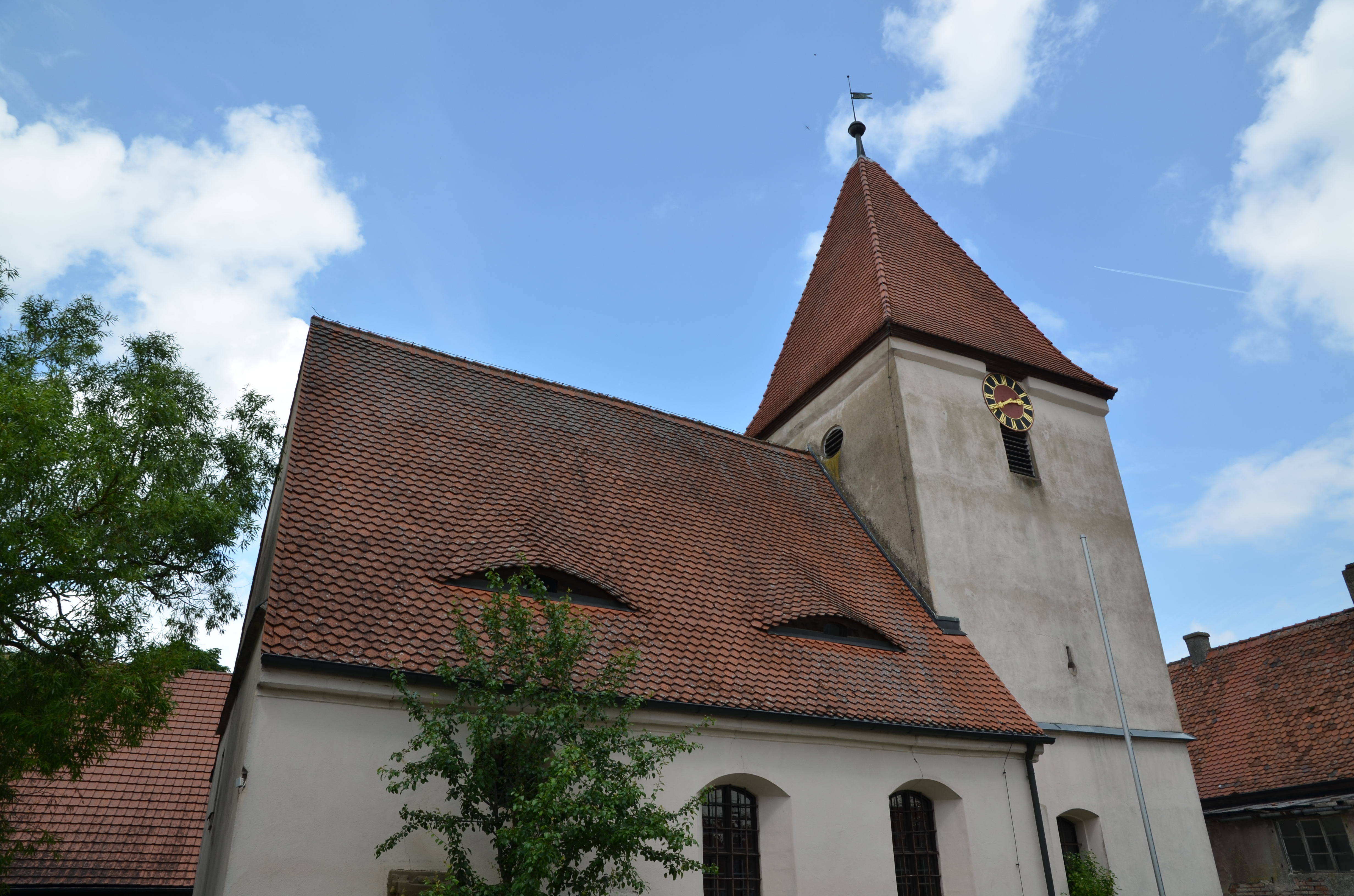 evang.-luth. Wehrkirche in Mitteldachstetten